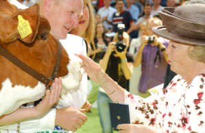 Koningin Beatrix geeft Flora, algemeen kampioene roodbont, een aai tijdens de NRM 2006